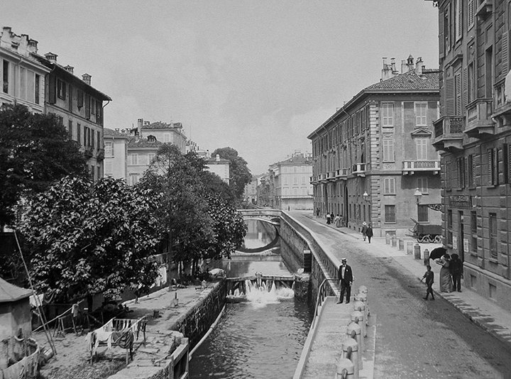 Cerchia dei navigli, Via Senato, Milano è visibile anche una chiusa